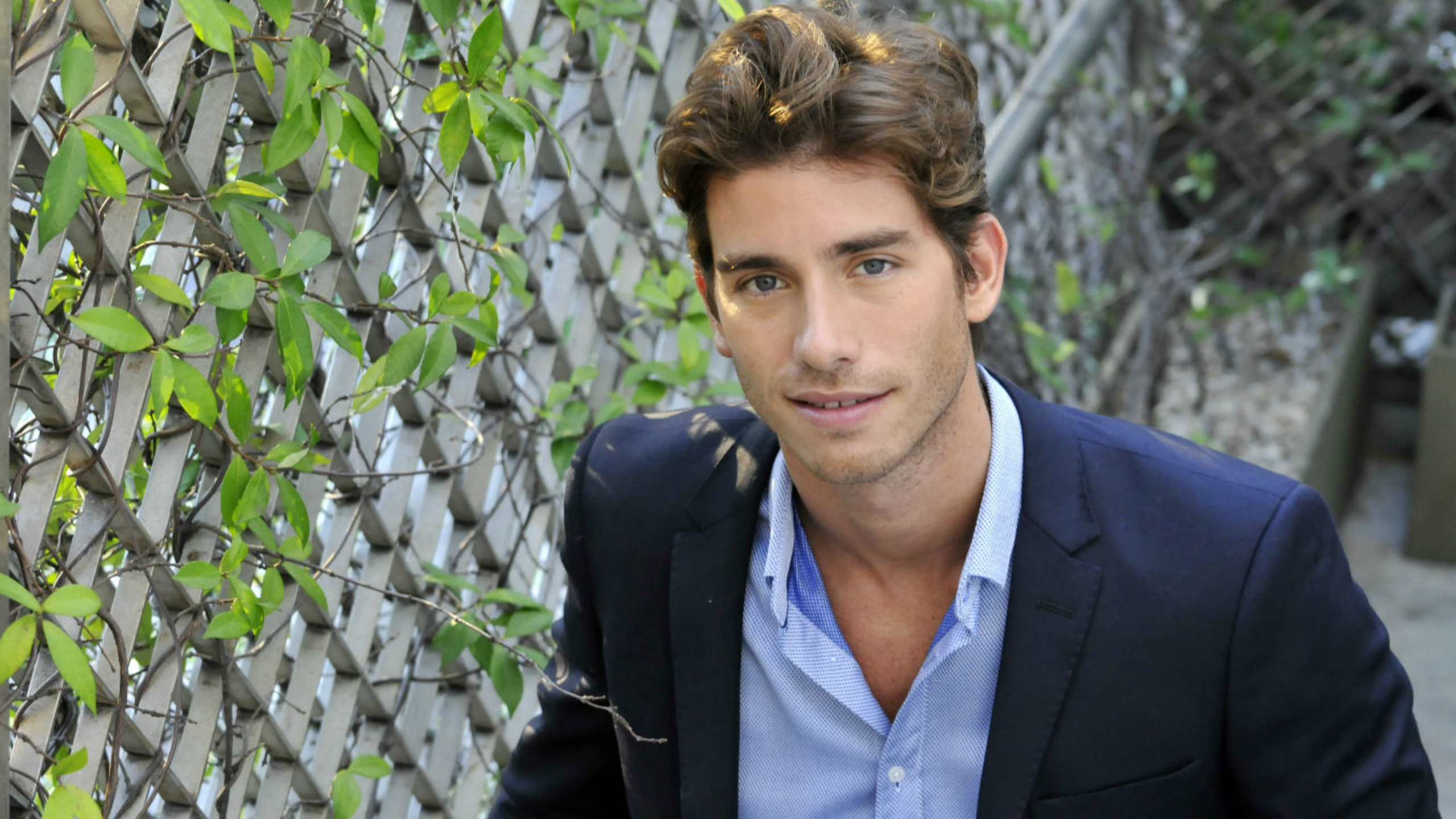 Victorio D'Alessandro 2017